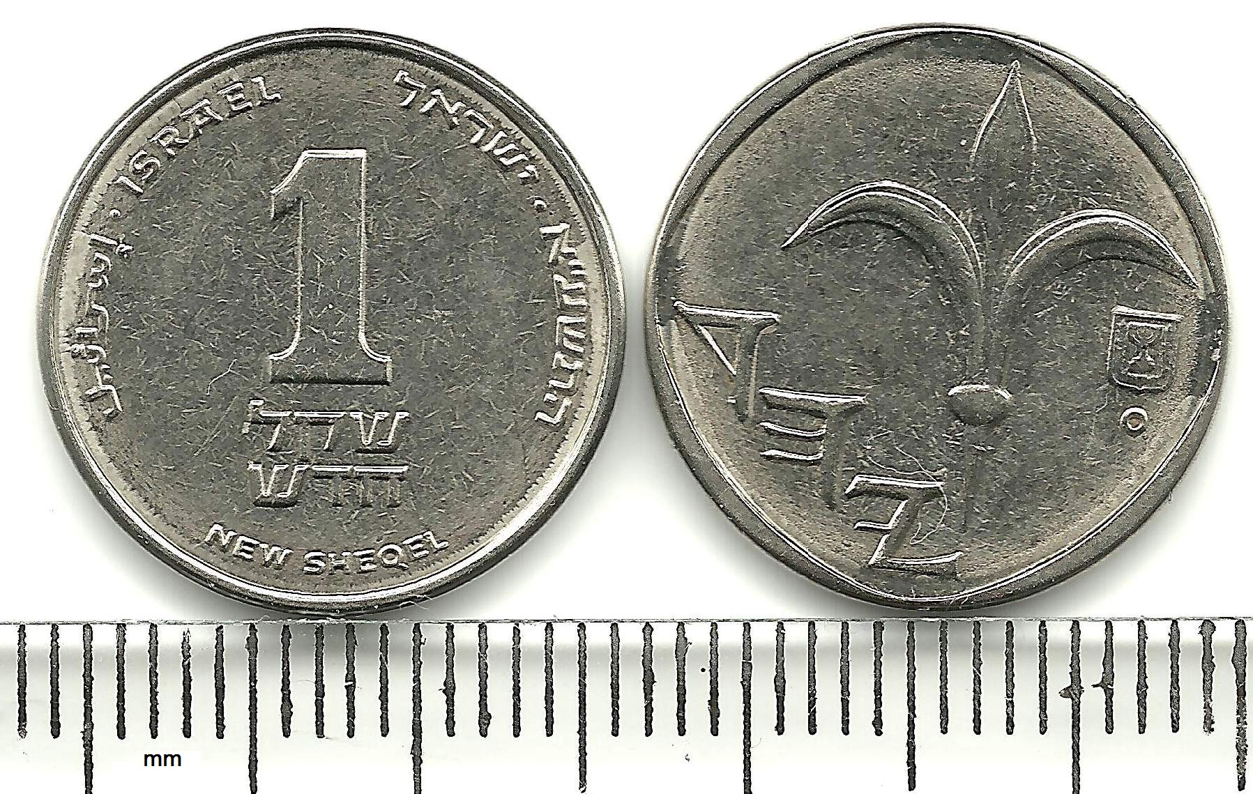 1 новый шекель (NIS, ISO 4217 -- ILS)